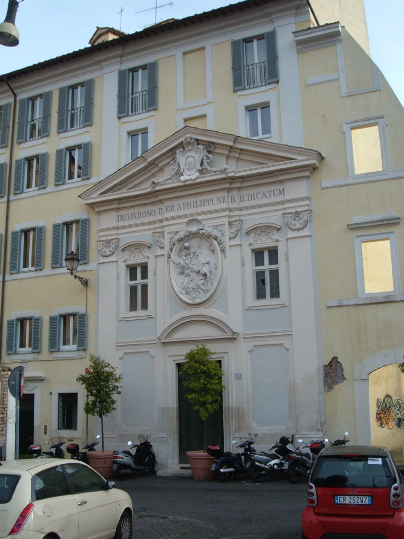 Chiesa di San Filippo Neri a Roma, nel rione Regola.